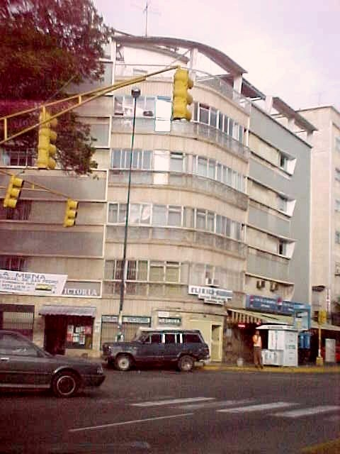 Avenida Presidente Medina (Avenida Victoria) en el municipio Libertador, Distrito Capital - Venezuela (2000)